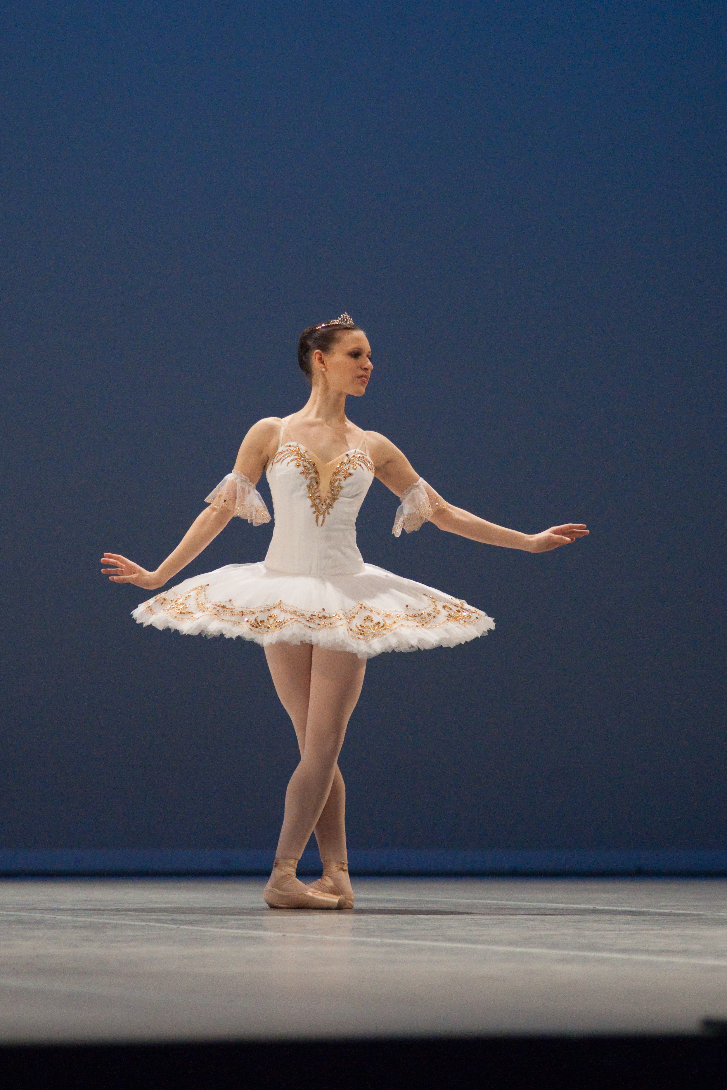 Variation extraite de Raymonda au Prix de Lausanne 2010. The making of this document was supported by Wikimedia CH. (Submit your project!) For all the files concerned, please see the category Supported by Wikimedia CH.